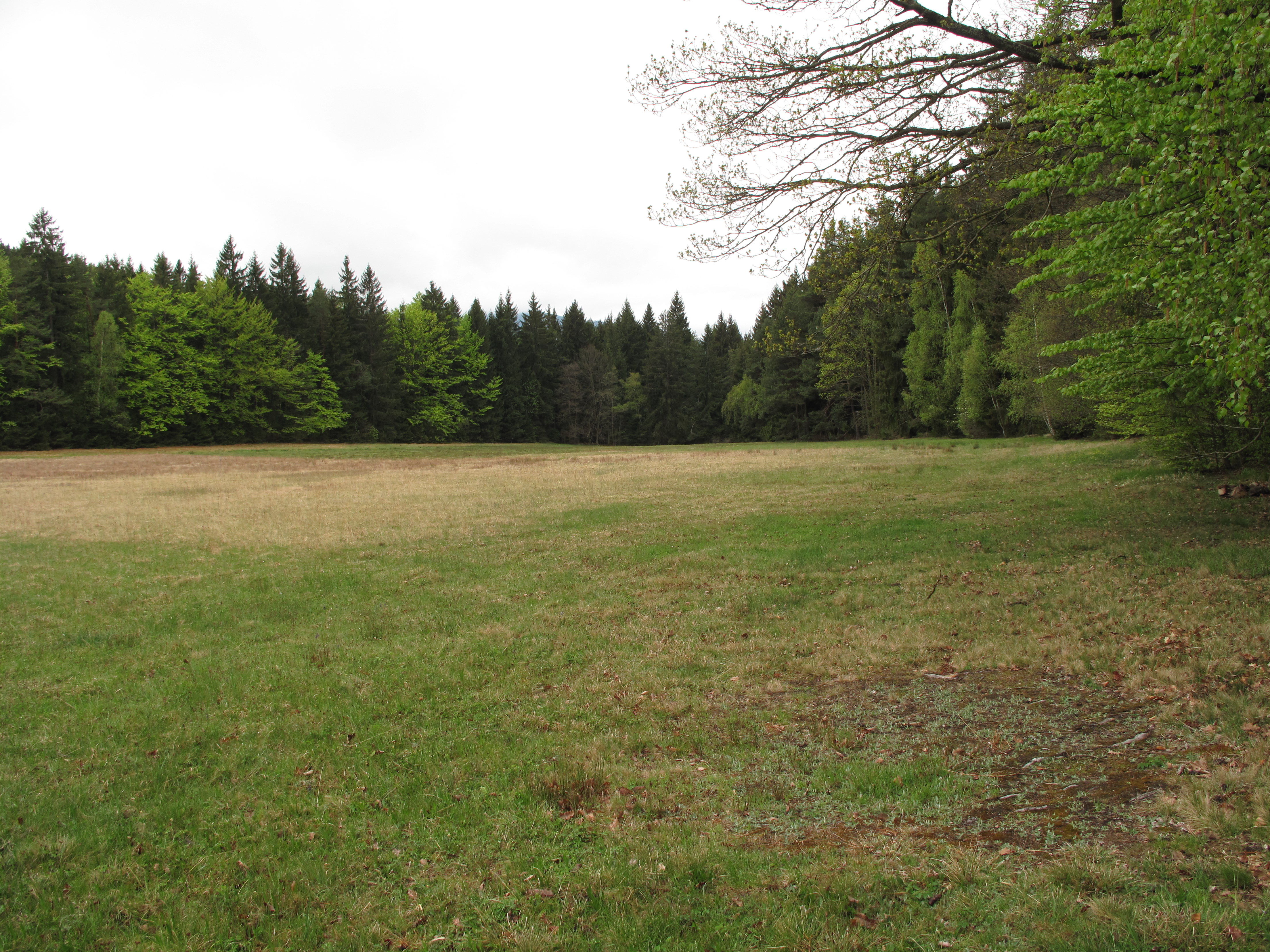 Louka přírodní rezervace Provázková louka. Okres Český Krumlov, Česká republika.